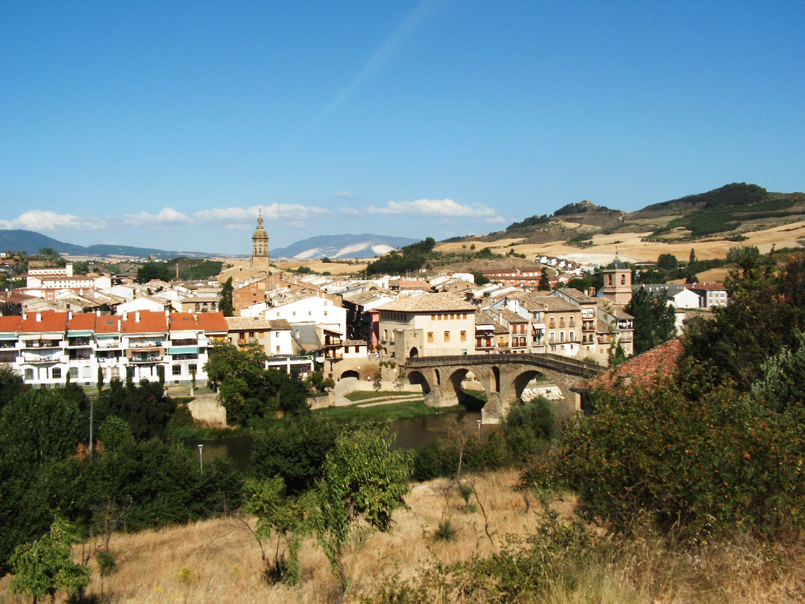 Vista de Puente la Reina (Navarra, España).